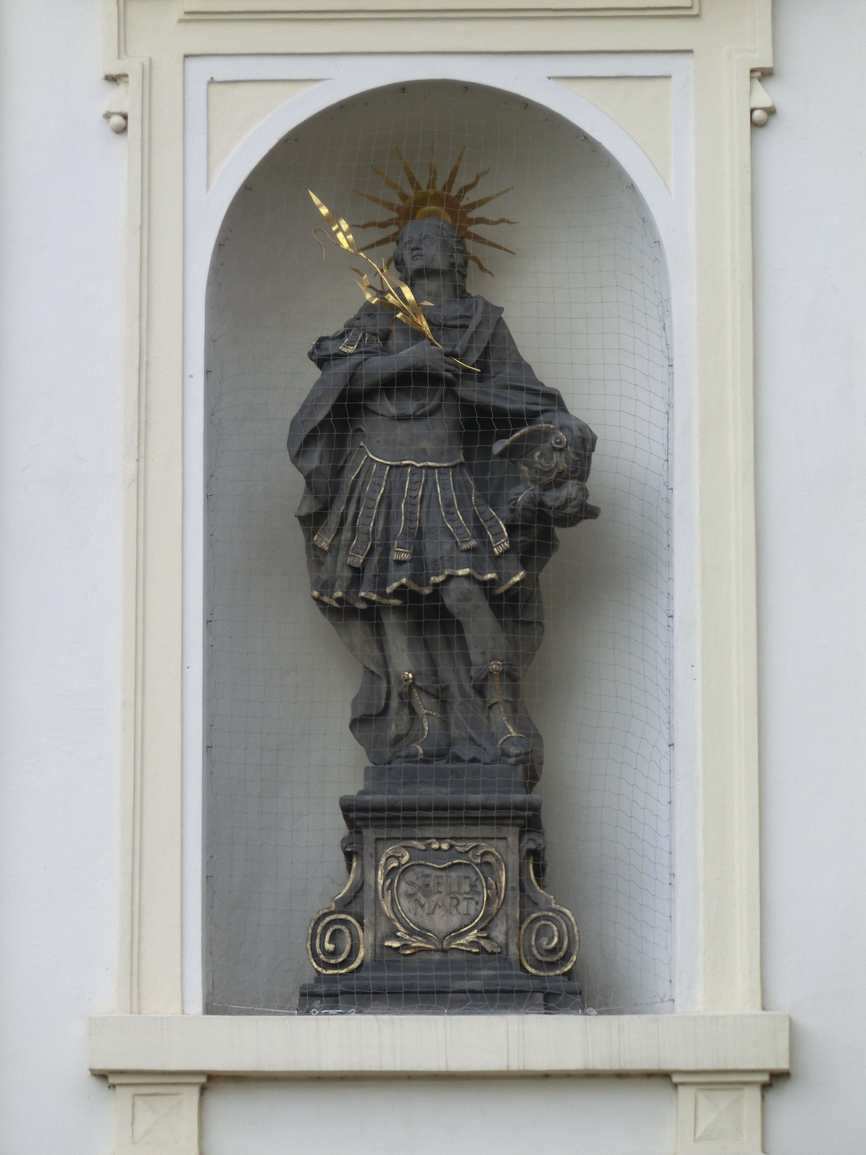 Socha sv. Felixe na průčelí litoměřické katedrály 01